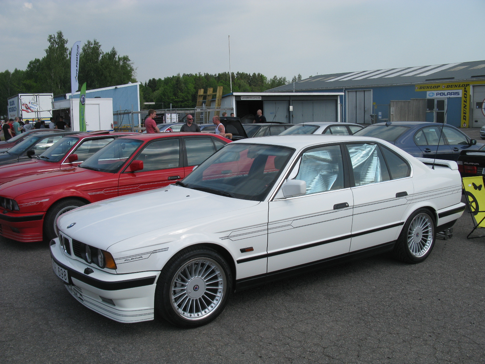 BMW Alpina B10 Biturbo E34